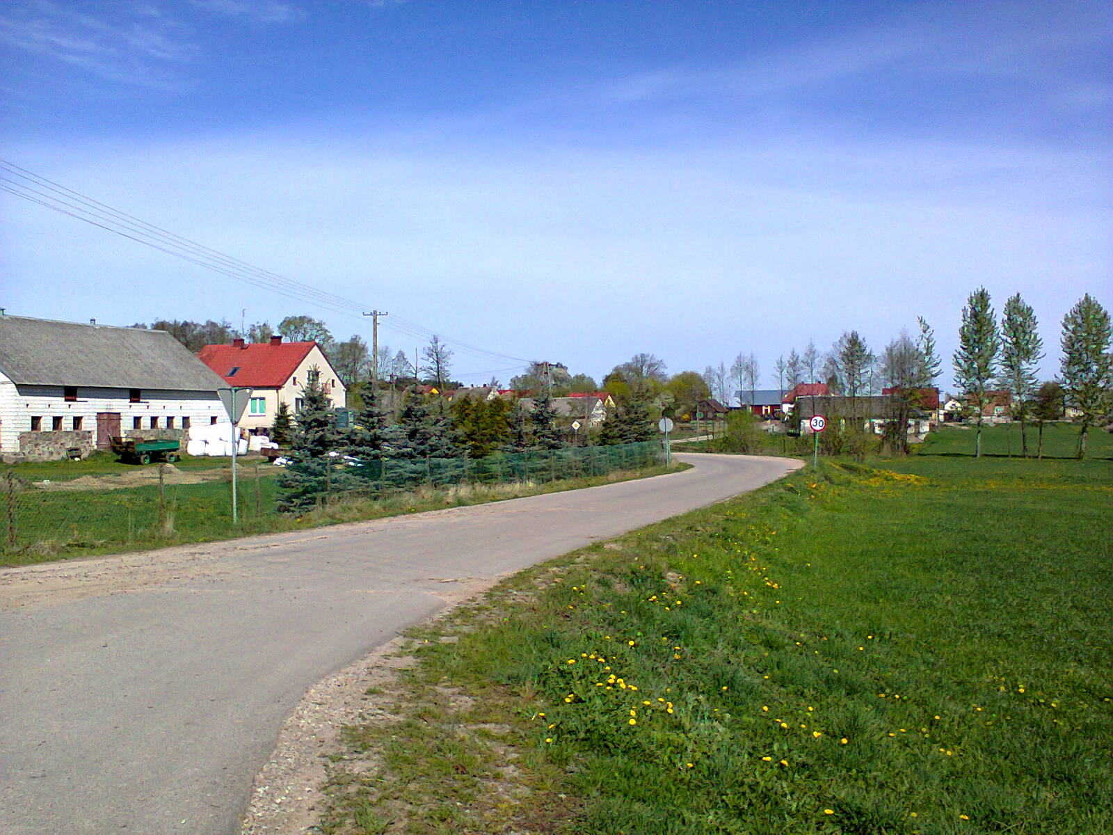 Obrytki